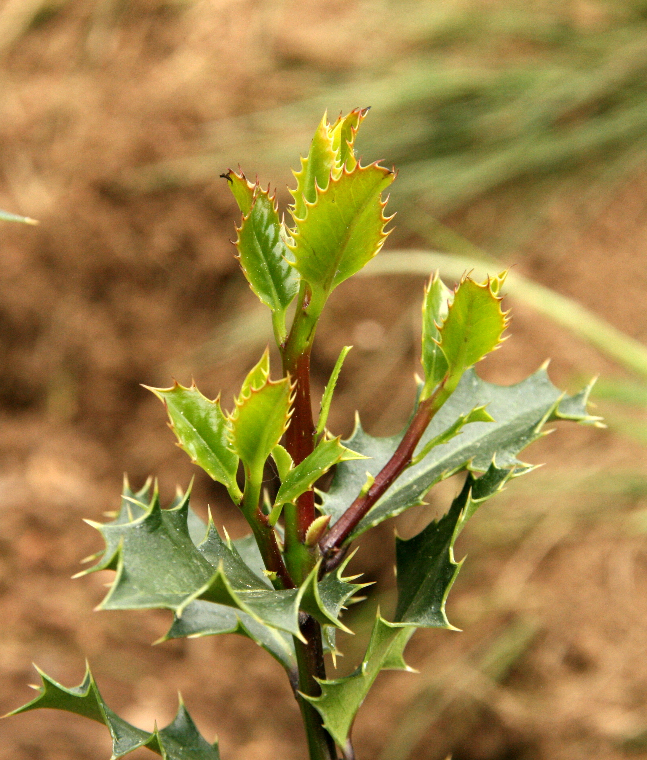 Acebo en la Senda de los Ecosistemas junto al Centro de visitantes Valsaín - Boca del Asno. Forma parte del lugar de interés comunitario de la Sierra de Guadarrama y del parque natural Sierra Norte de Guadarrama. This is a photography of a Special Area of Conservation in Spain with the ID: ES4160109. Natura2000 entry, EEA entry